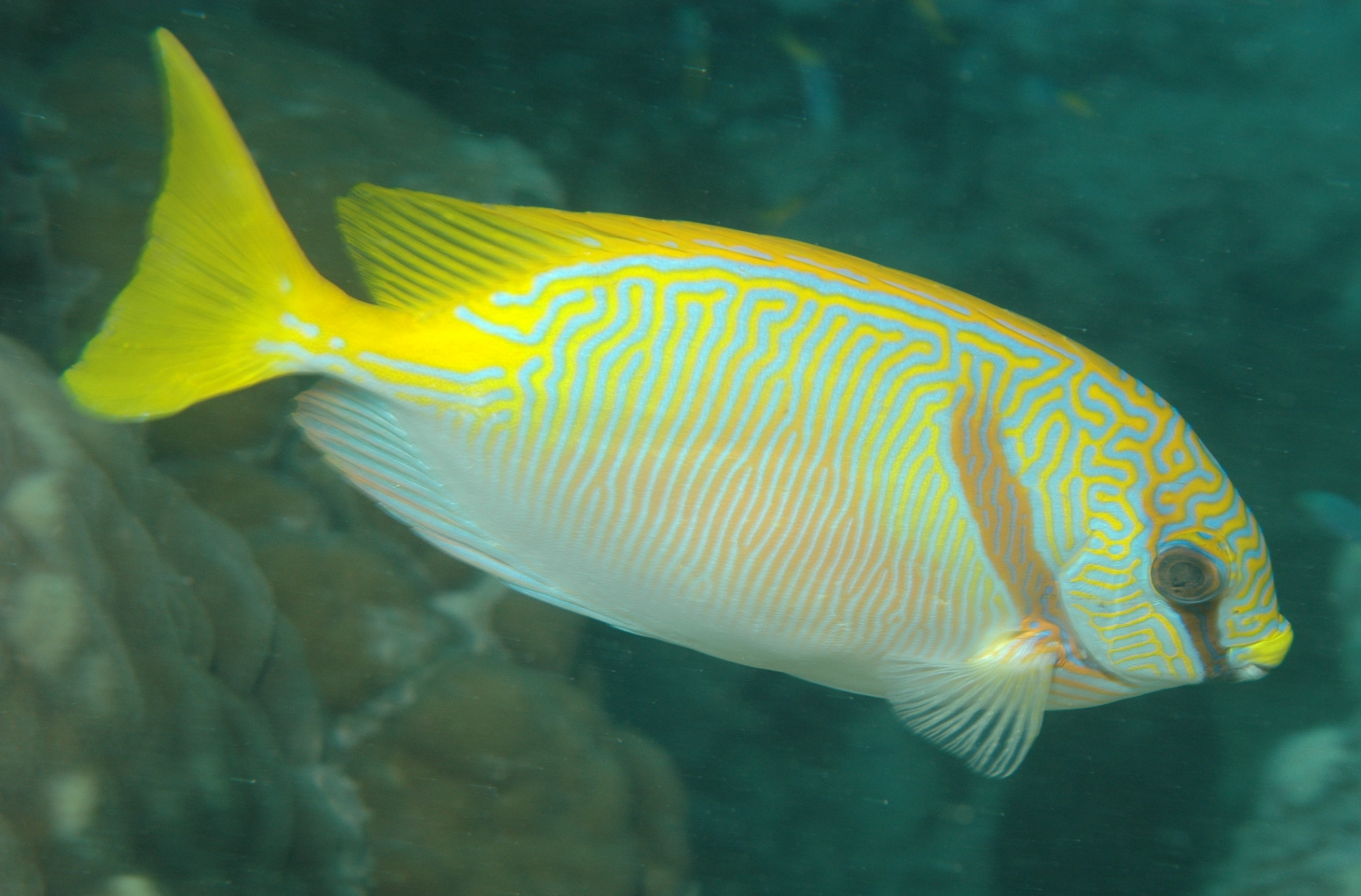 Siganus doliatus